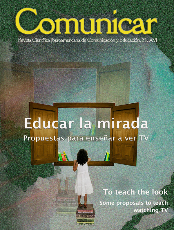 Portada No. 31